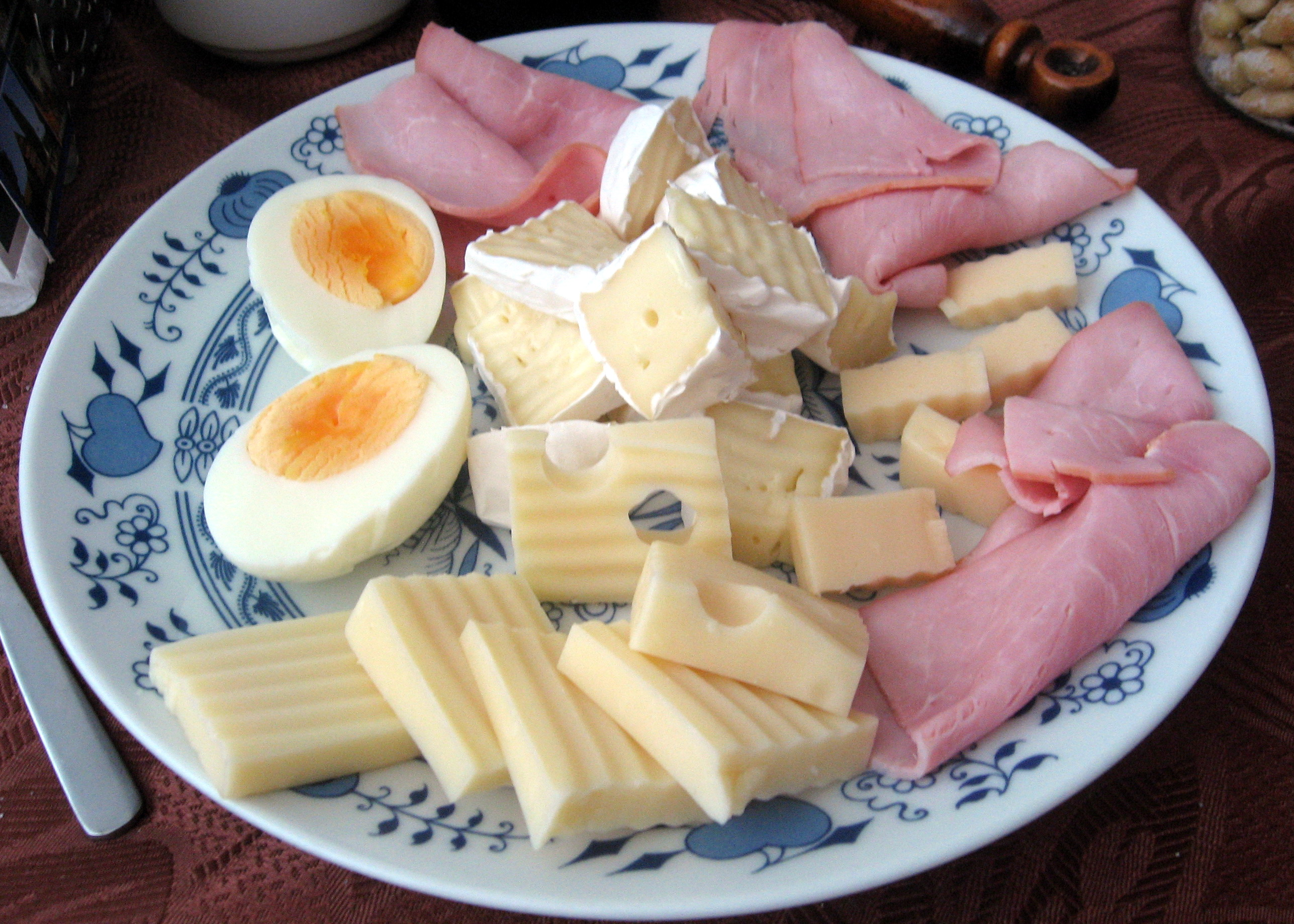 Talíř se třemi druhy sýrů, šunkou a vajíčkem na tvrdo